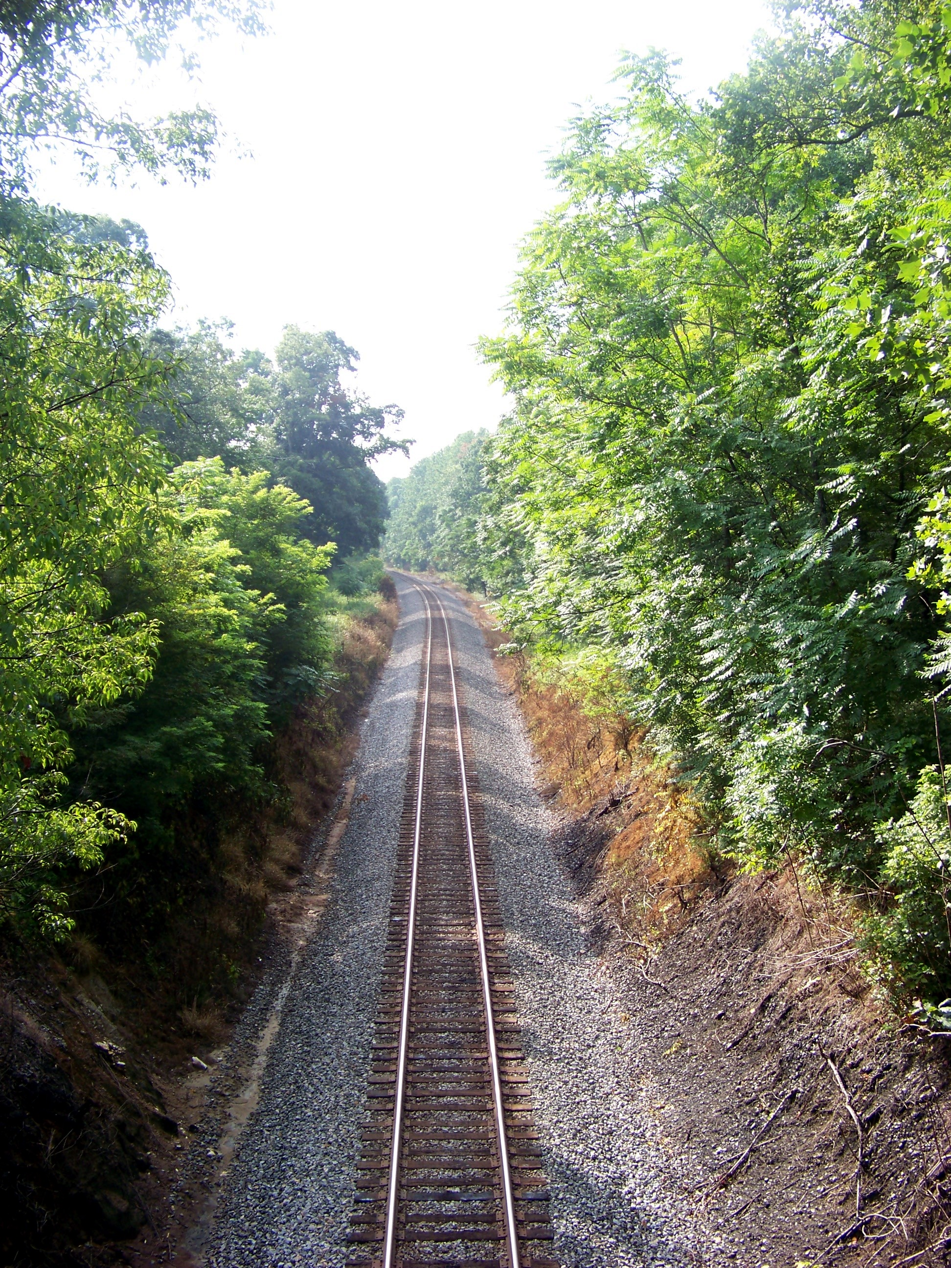 Lakes, VA, USA